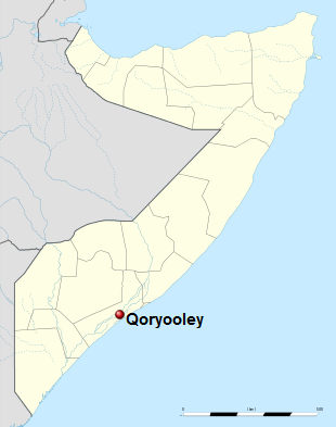 Mapa localizador de Qoryooley.